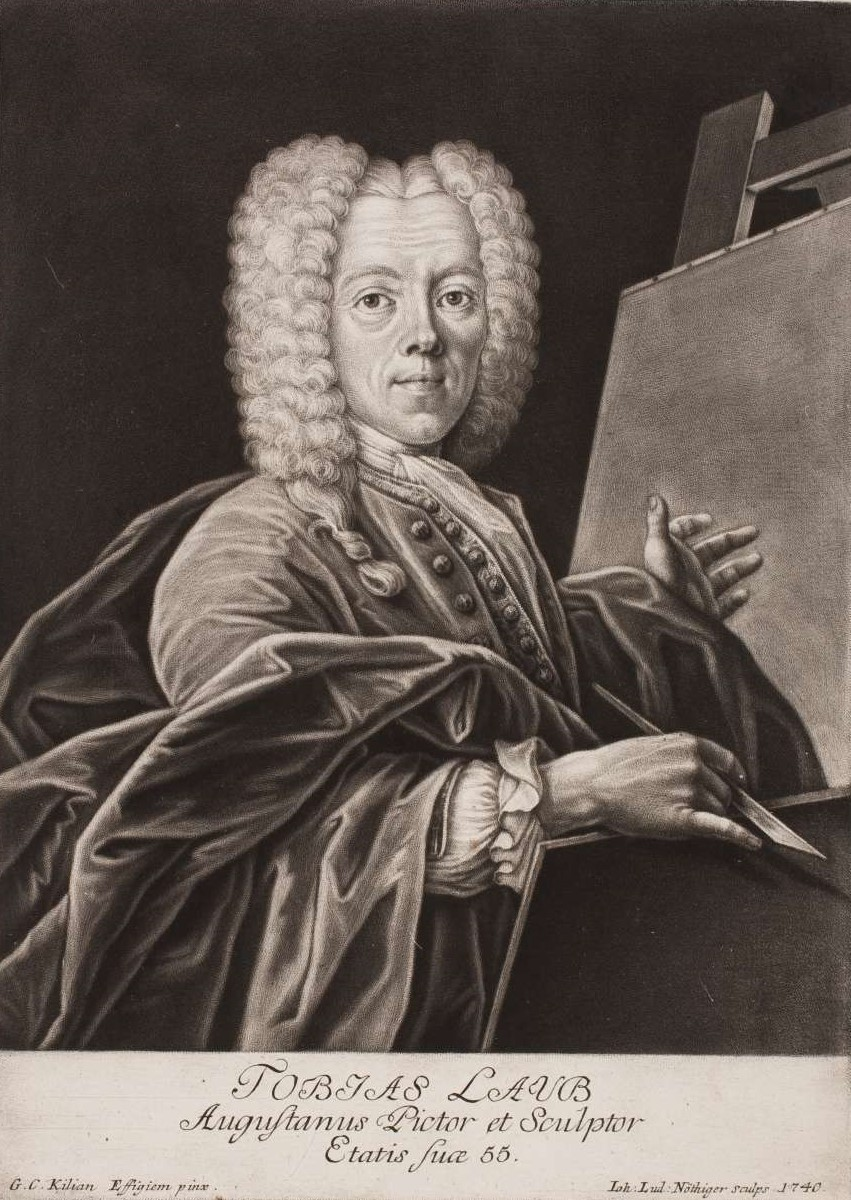 Tobias Laub (1685–1761), Kupferstich von Johann Ludwig Nöthiger (1719–1782) nach einem Gemälde von Georg Christoph Kilian (1709–1781)